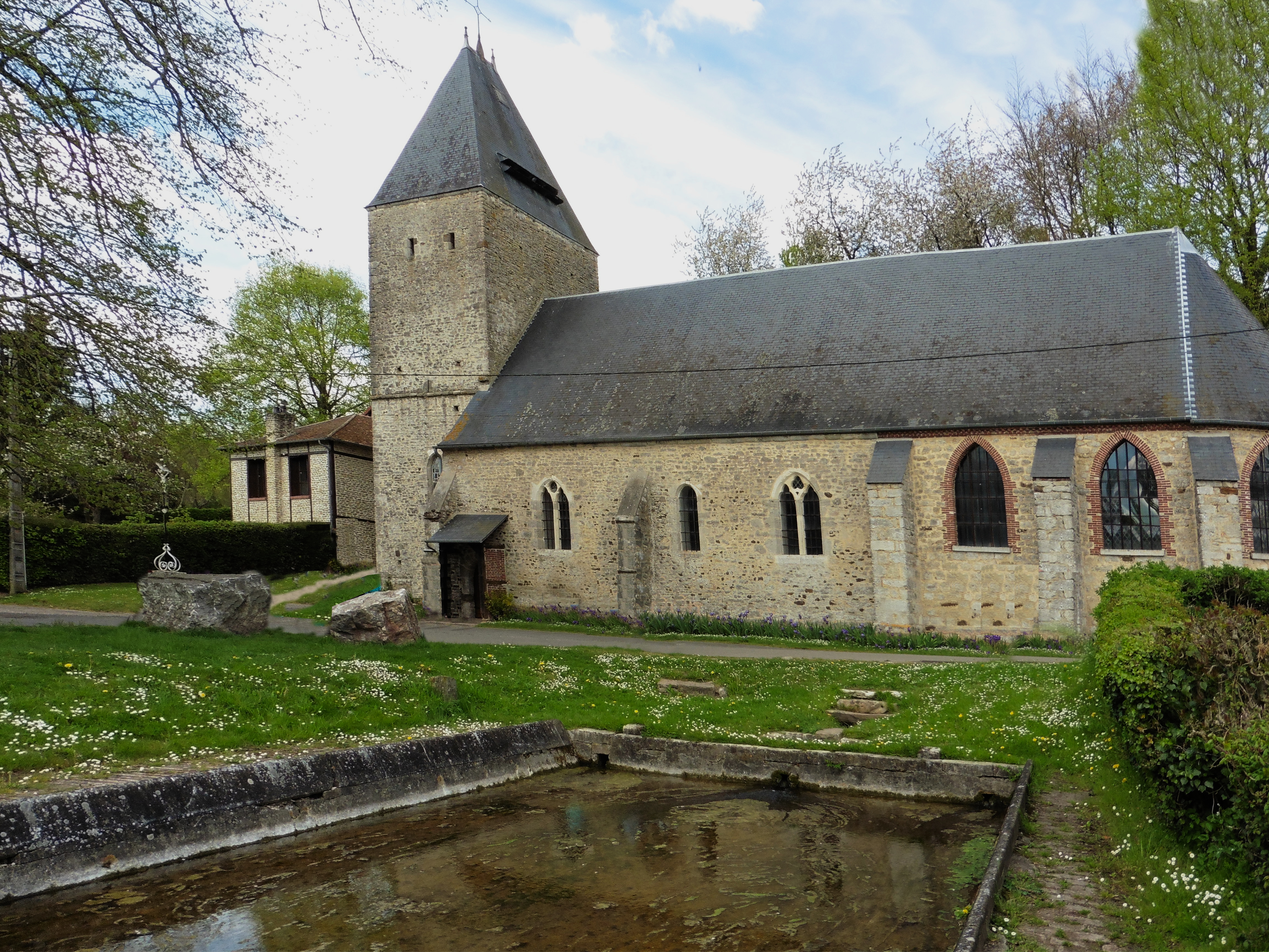 L'église Saint Samson - son ancien lavoir Saint-Samson-la-Poterie à Oise, France.